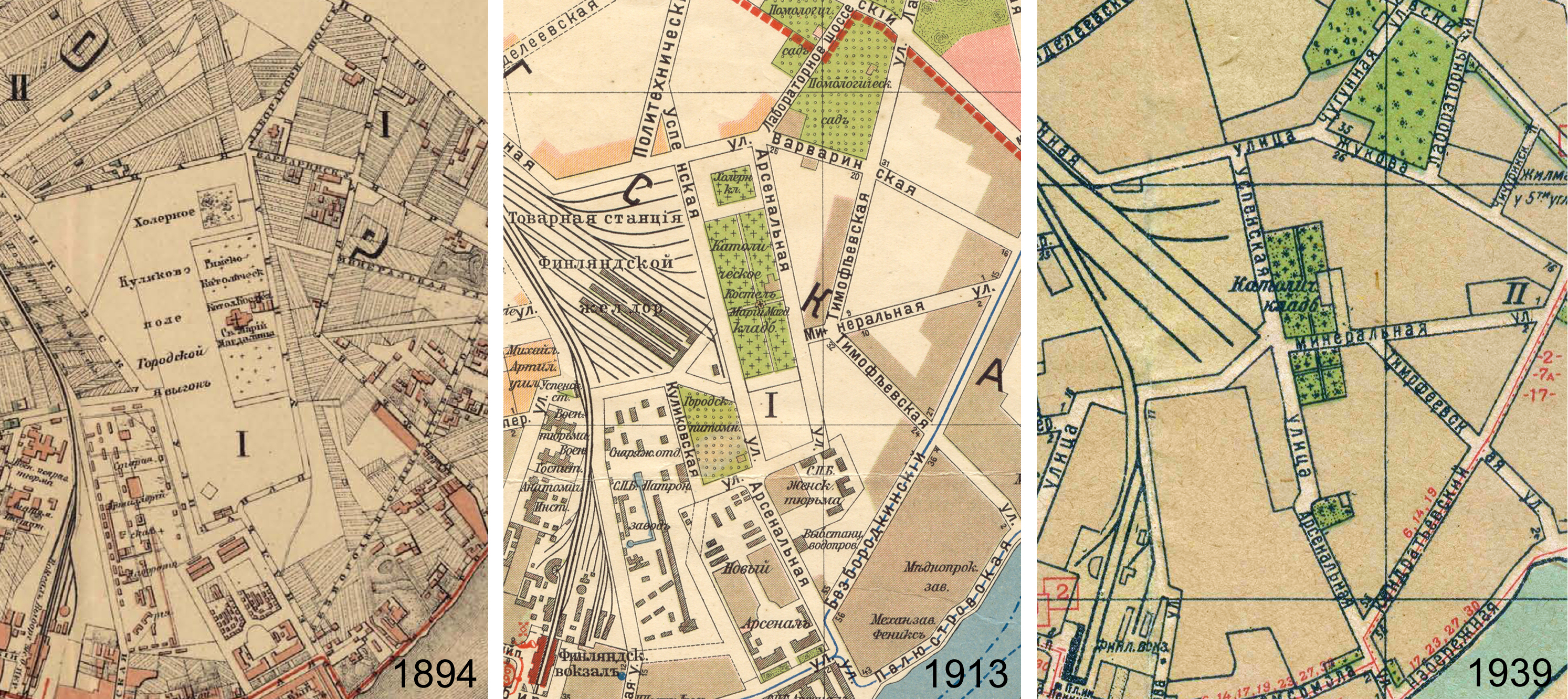 Выборгское римско-католическое кладбище на планах Петербурга 1894, 1913, 1939 годов.